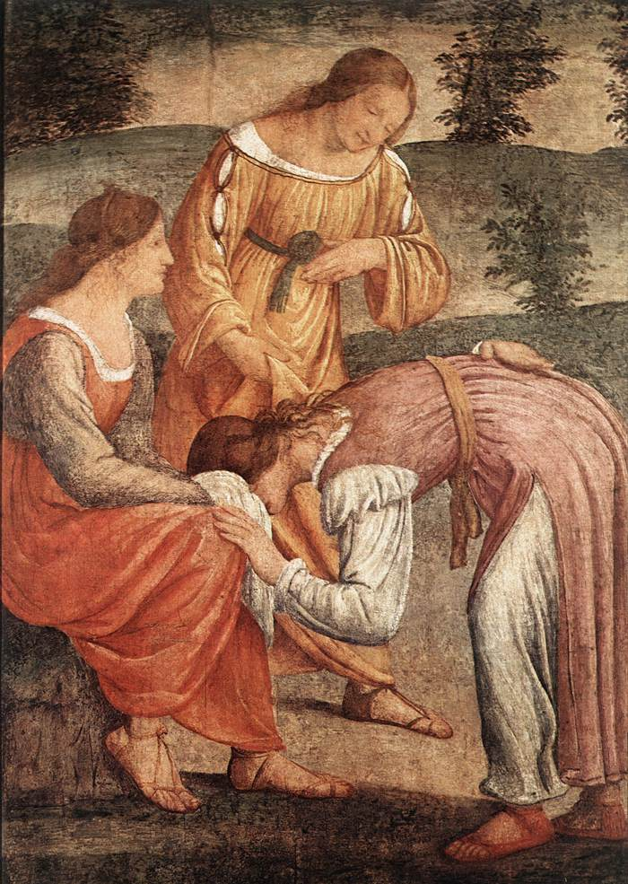 detail